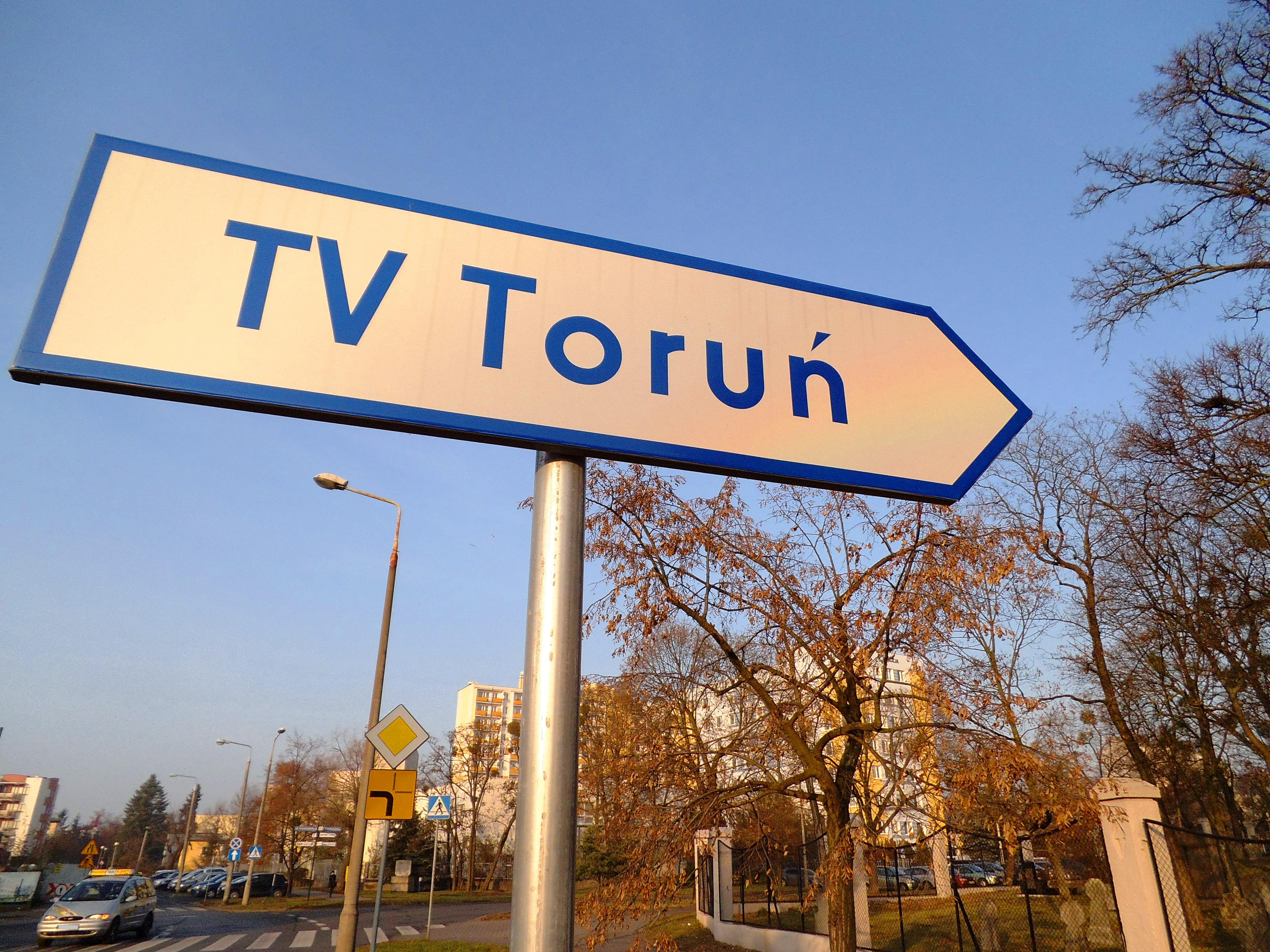 Drogowskaz na placu Towarzystwa Miłośników Torunia